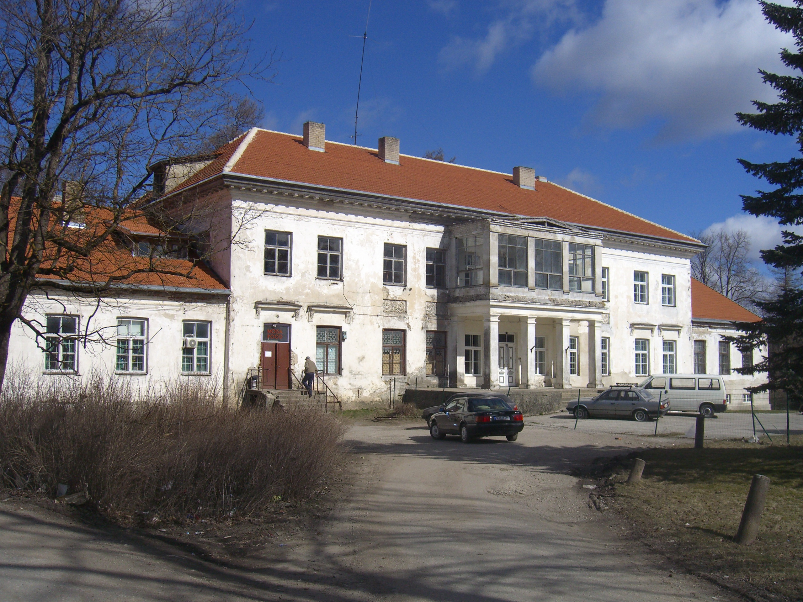 Kohila mõisa peahoone